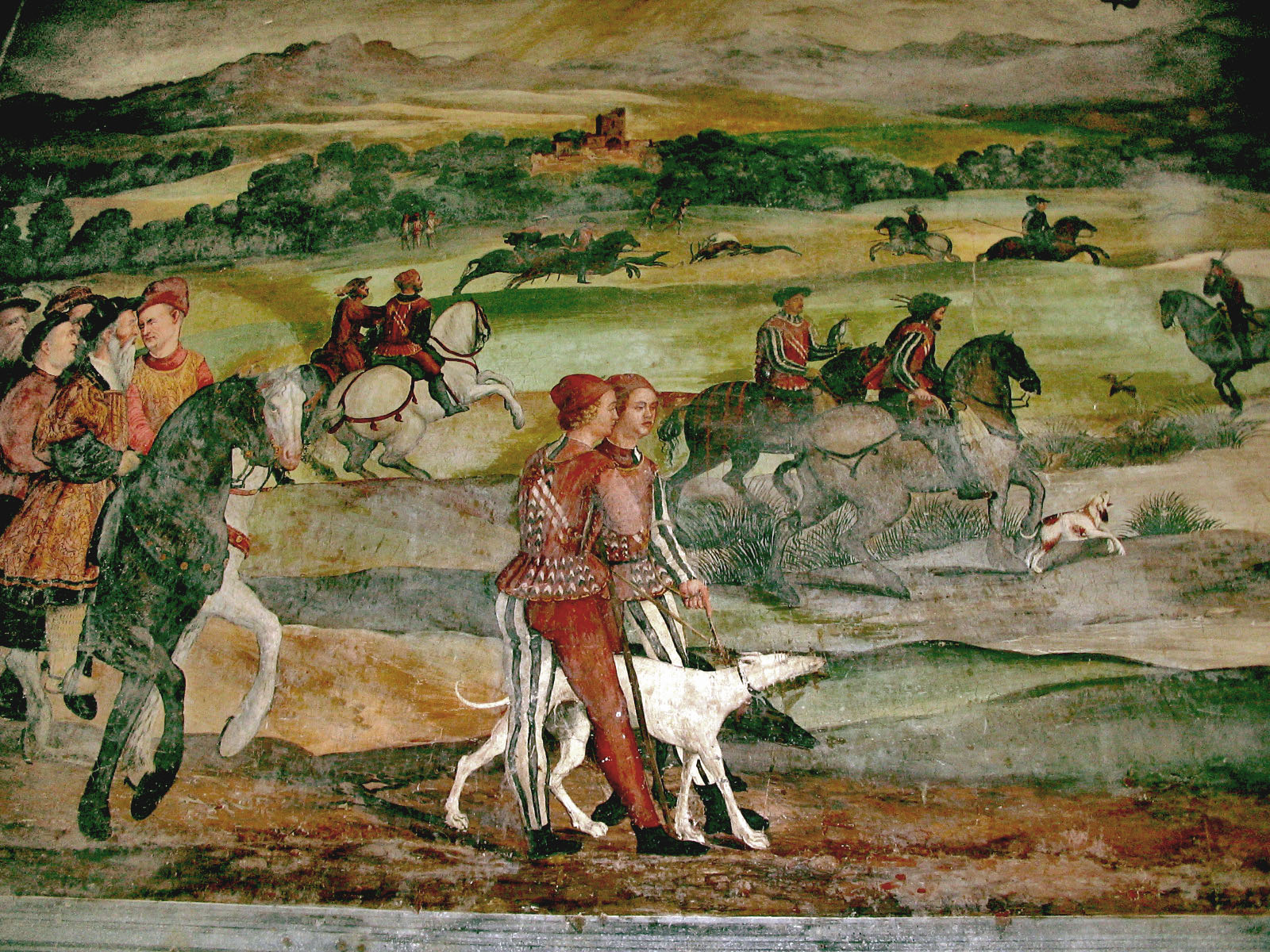 Scena di caccia